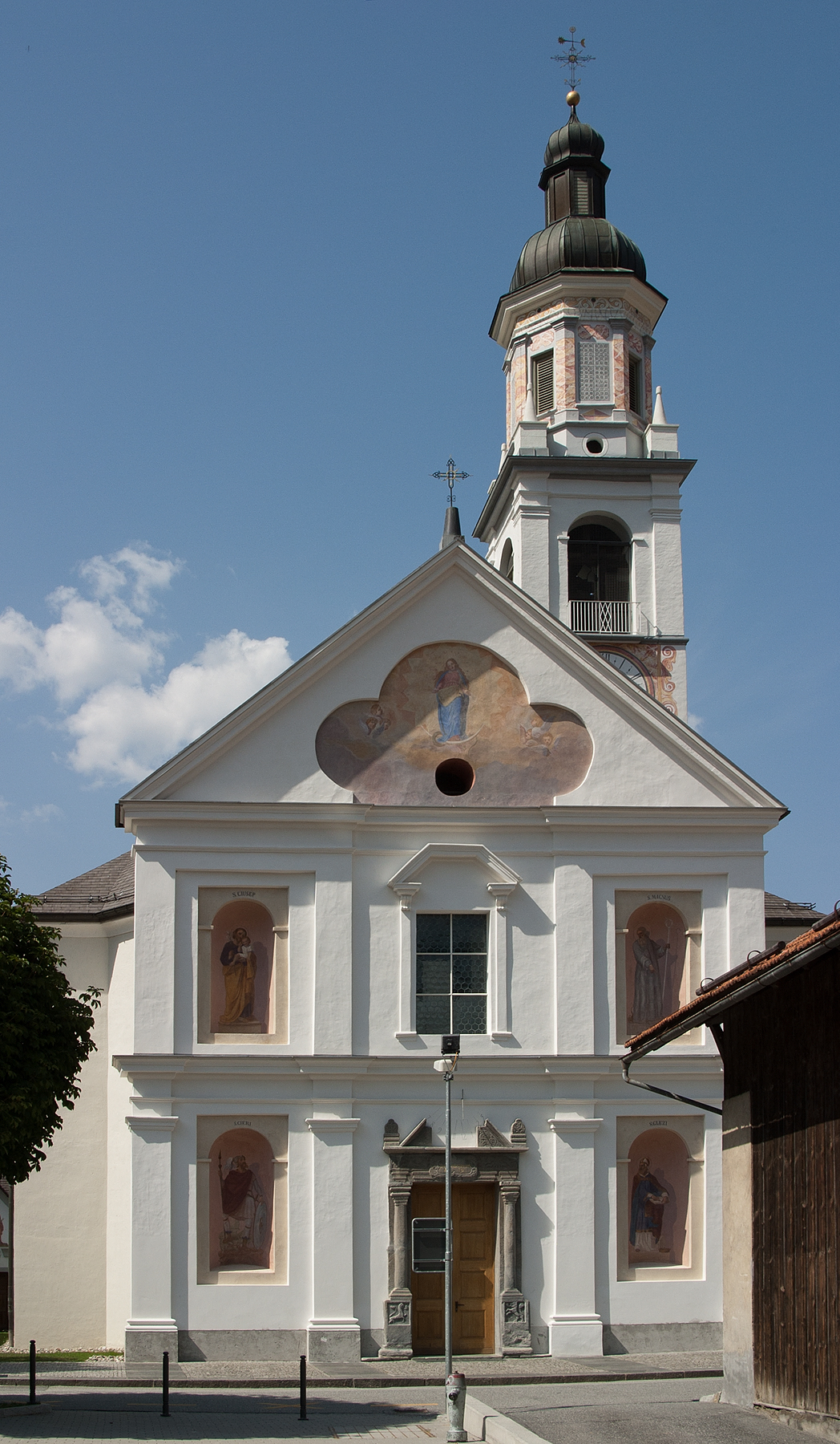 Katholische Kirche Santa Maria in Rhäzüns